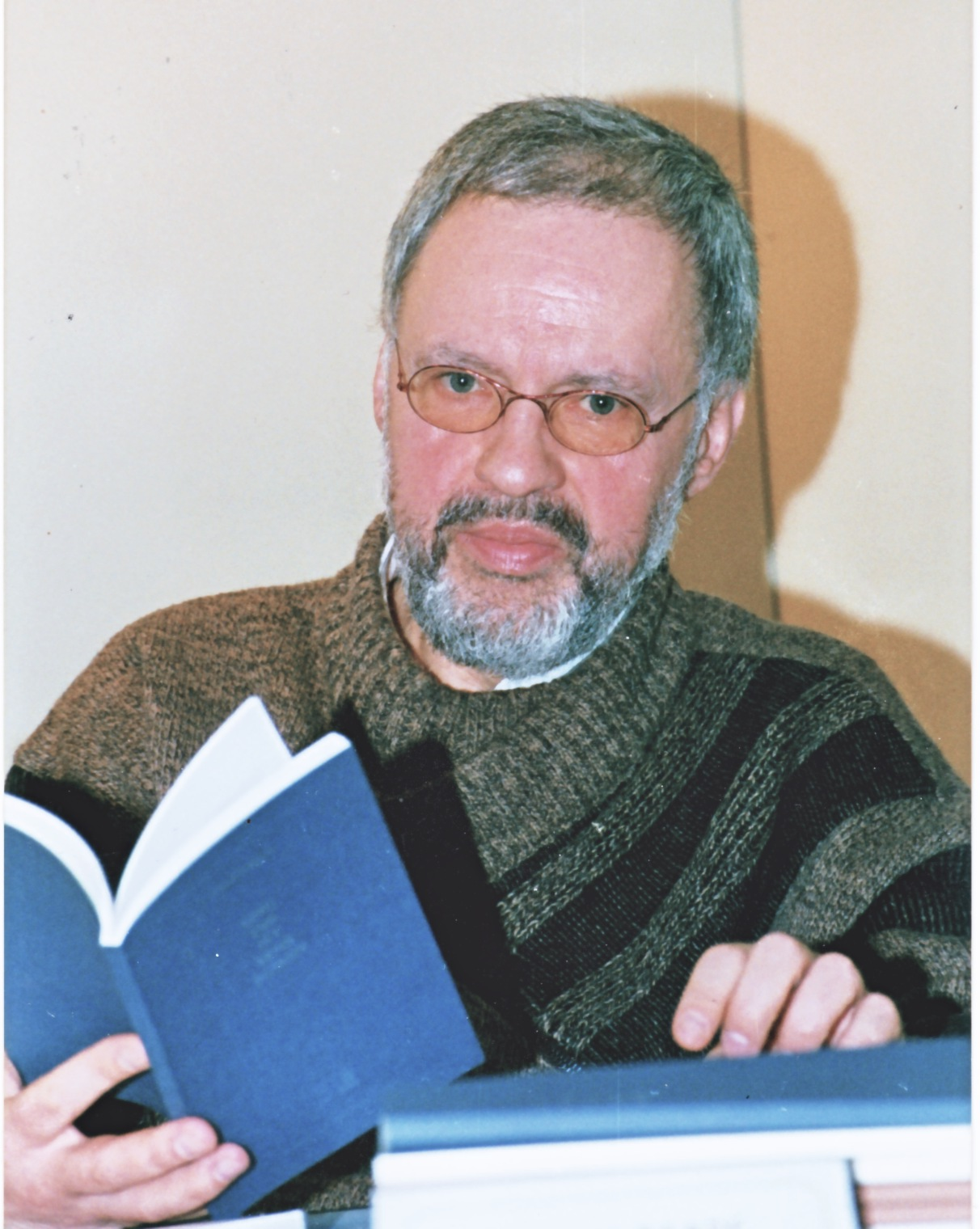 Der Autor in einer Buchlesung 1999